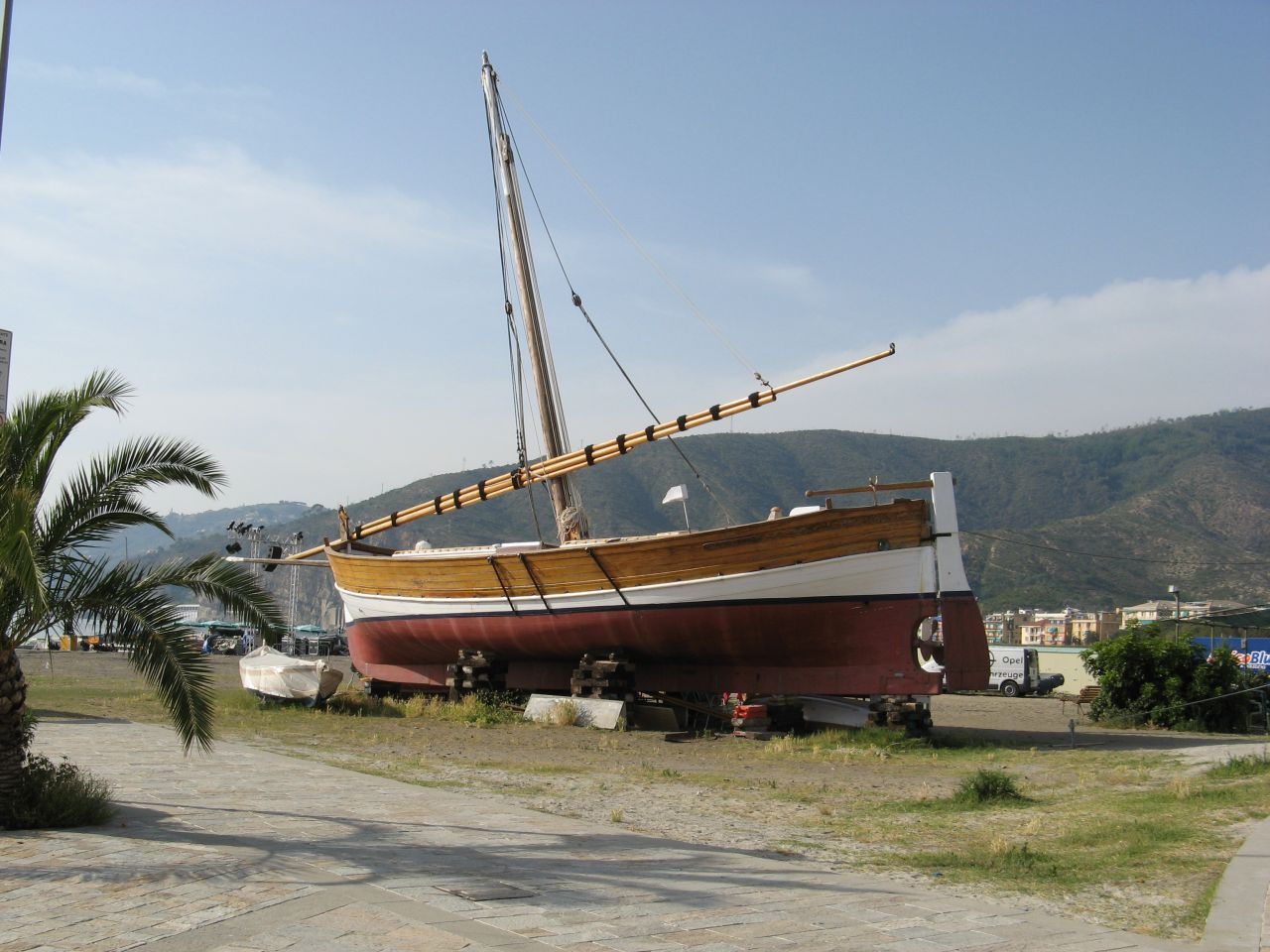 Il Nuovo Aiuto di Dio, uno degli ultimi leudi calato sulla spiaggia a Sestri Levante, Liguria, Italia.